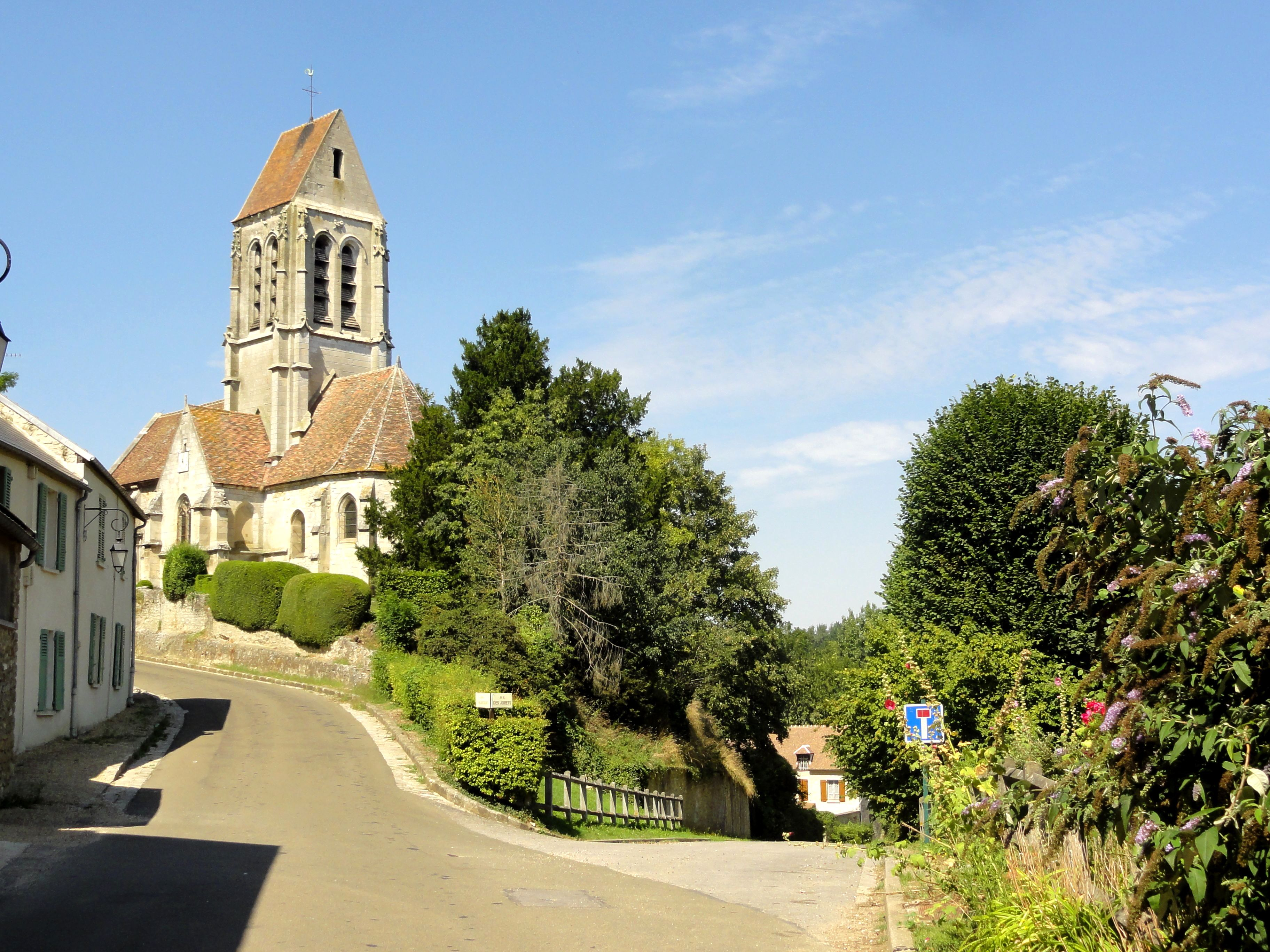 Vue depuis l'est.